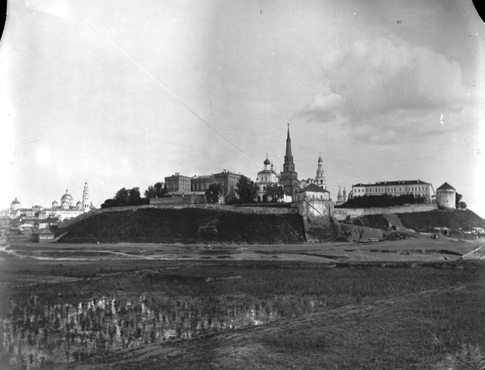 Общий вид Кремля. Казань.